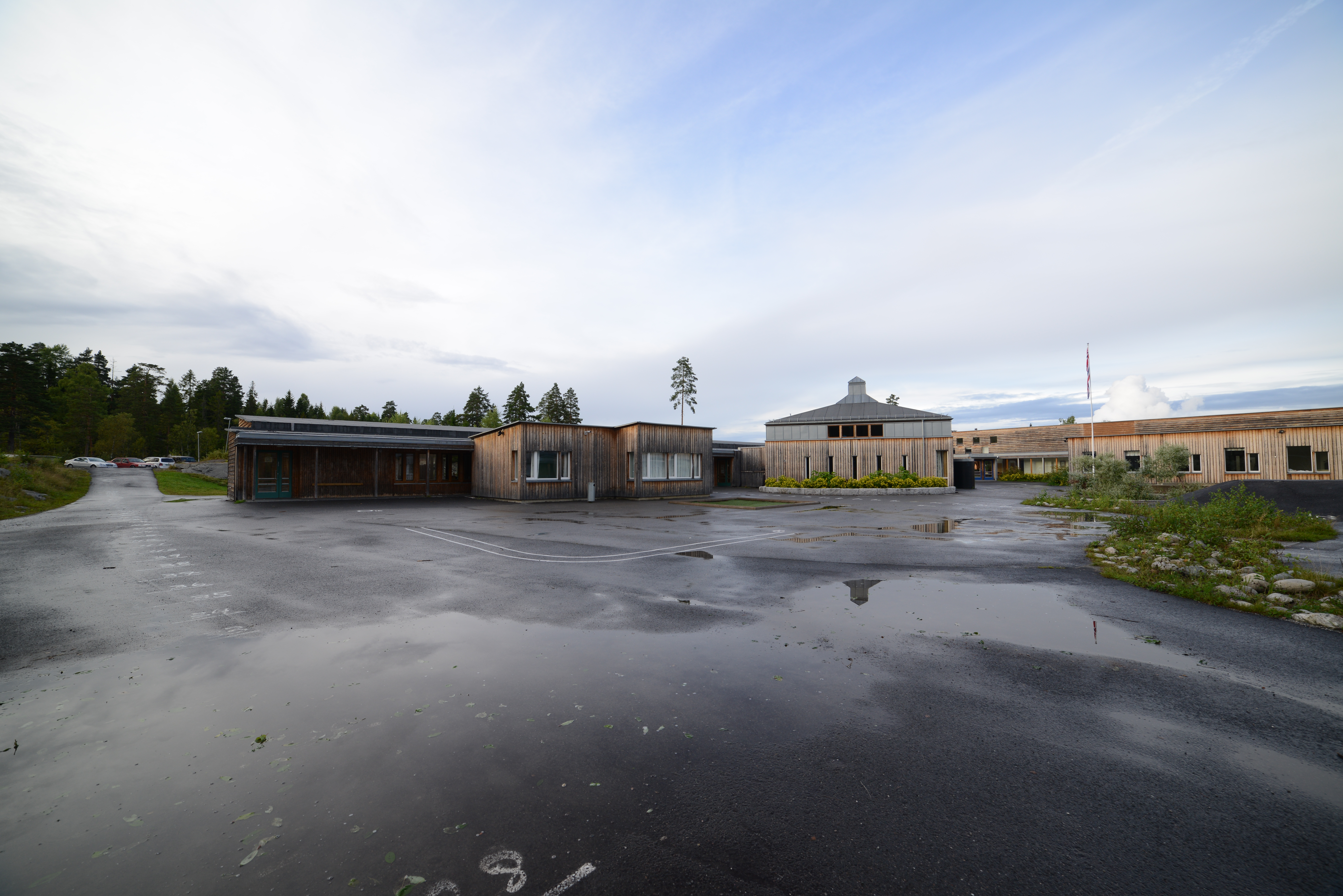 Eltonåsen skole i Nannestad